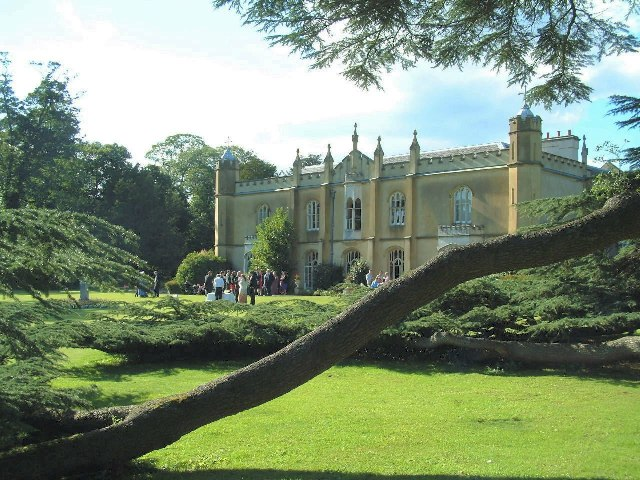 Missenden Abbey